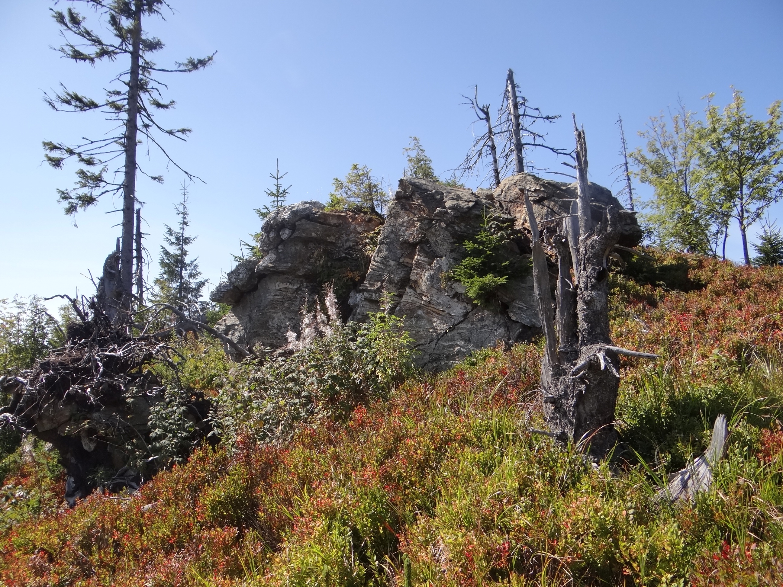 Skały Pod Košariskami